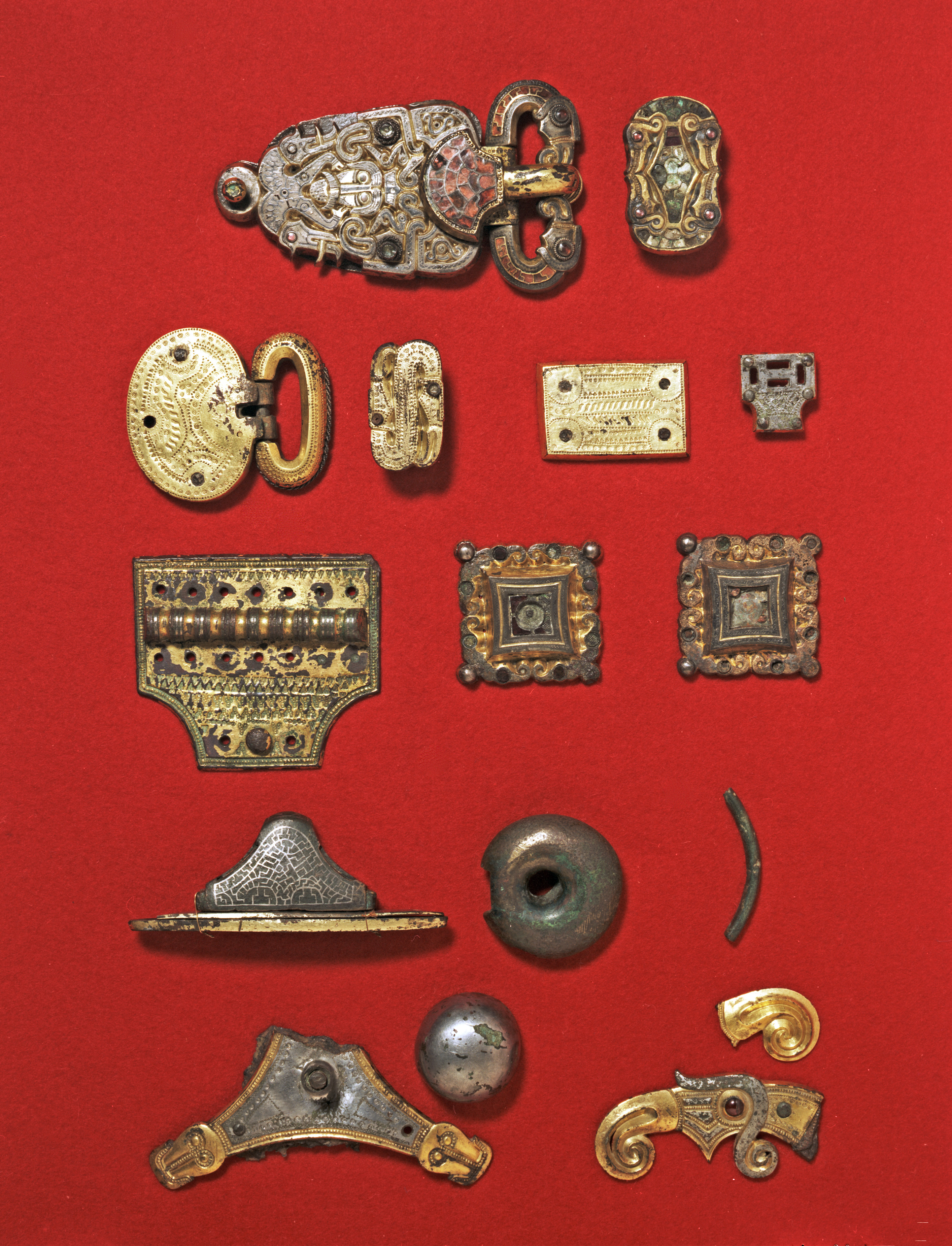 Deler av Åkerfunnet, : C4901 spenne, C21406 beslag, C5651 spenne, C5652 beslag, C5897 beslag, C10379 ukjent C16605 beslag, C4902 spenne, C14785 spenne C16604 sverdknapp, C14787 nagle, C14788a drikkehornbeslag C8347 skjoldbule, C14786 beslag (fragment), C4903 beslag. Kulturhistorisk museum, UiO / CC BY-SA 4.0